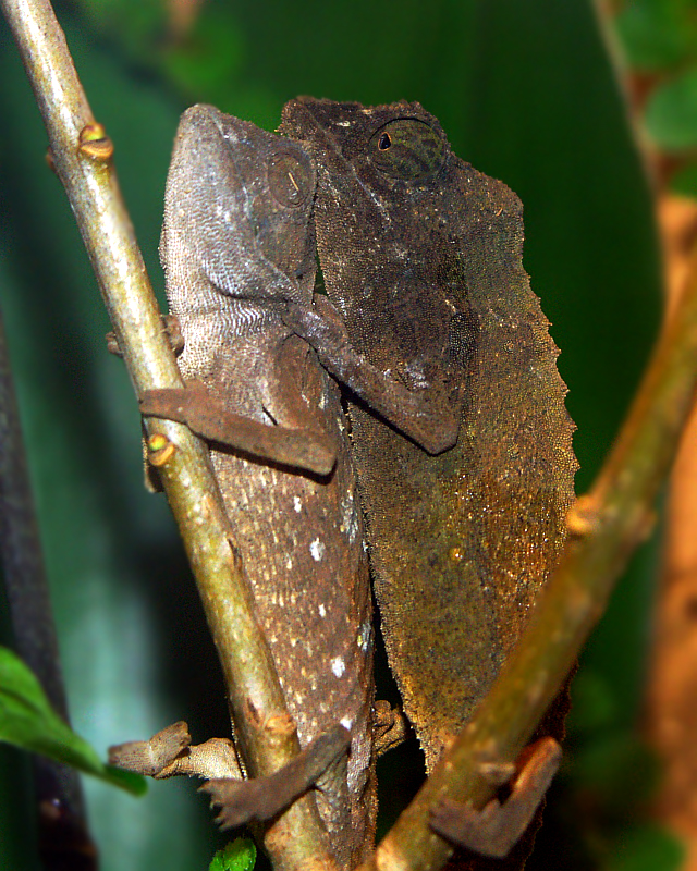 Rieppeleon brevicaudatus mating